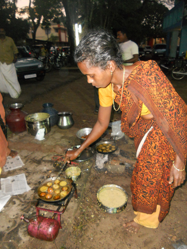 ഉണ്ണിയപ്പം ഉണ്ടാക്കുന്നു